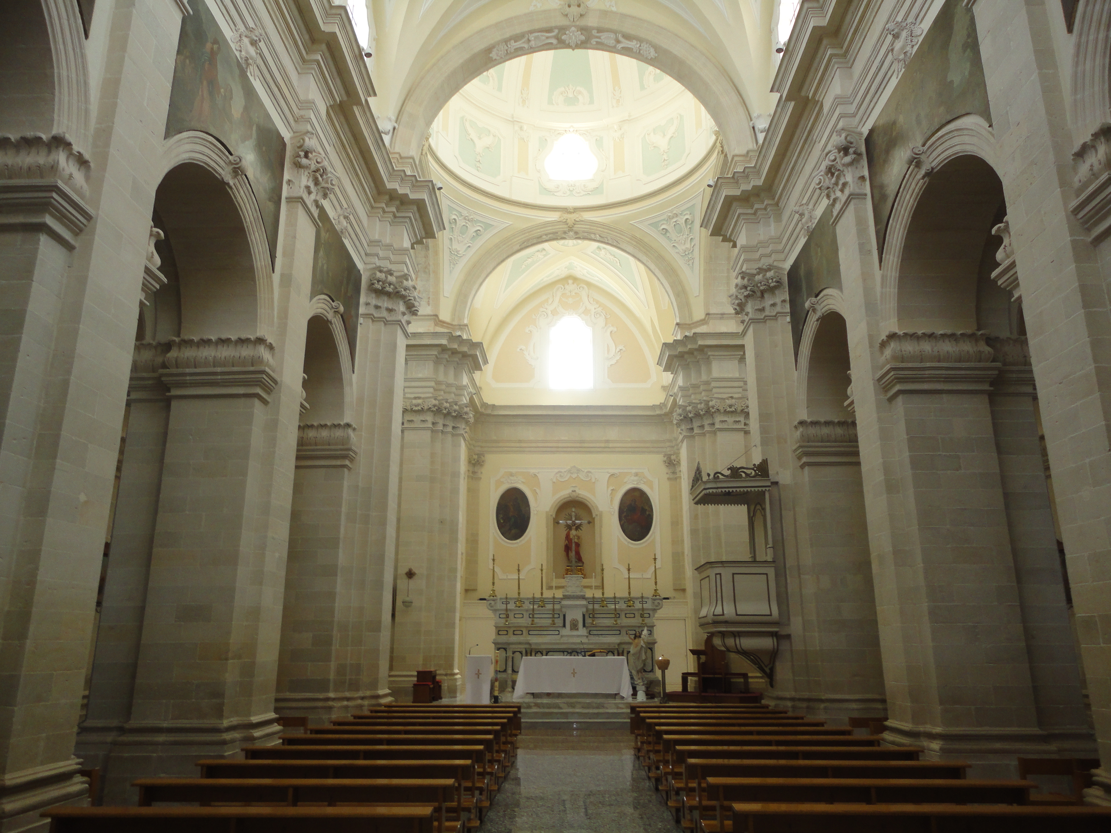 Interno chiesa madre Uggiano la Chiesa, Lecce